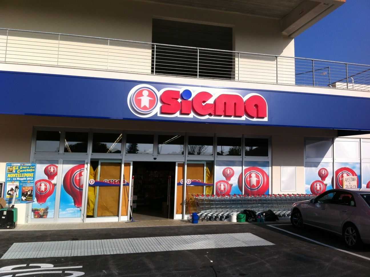 Punto vendita Sigma